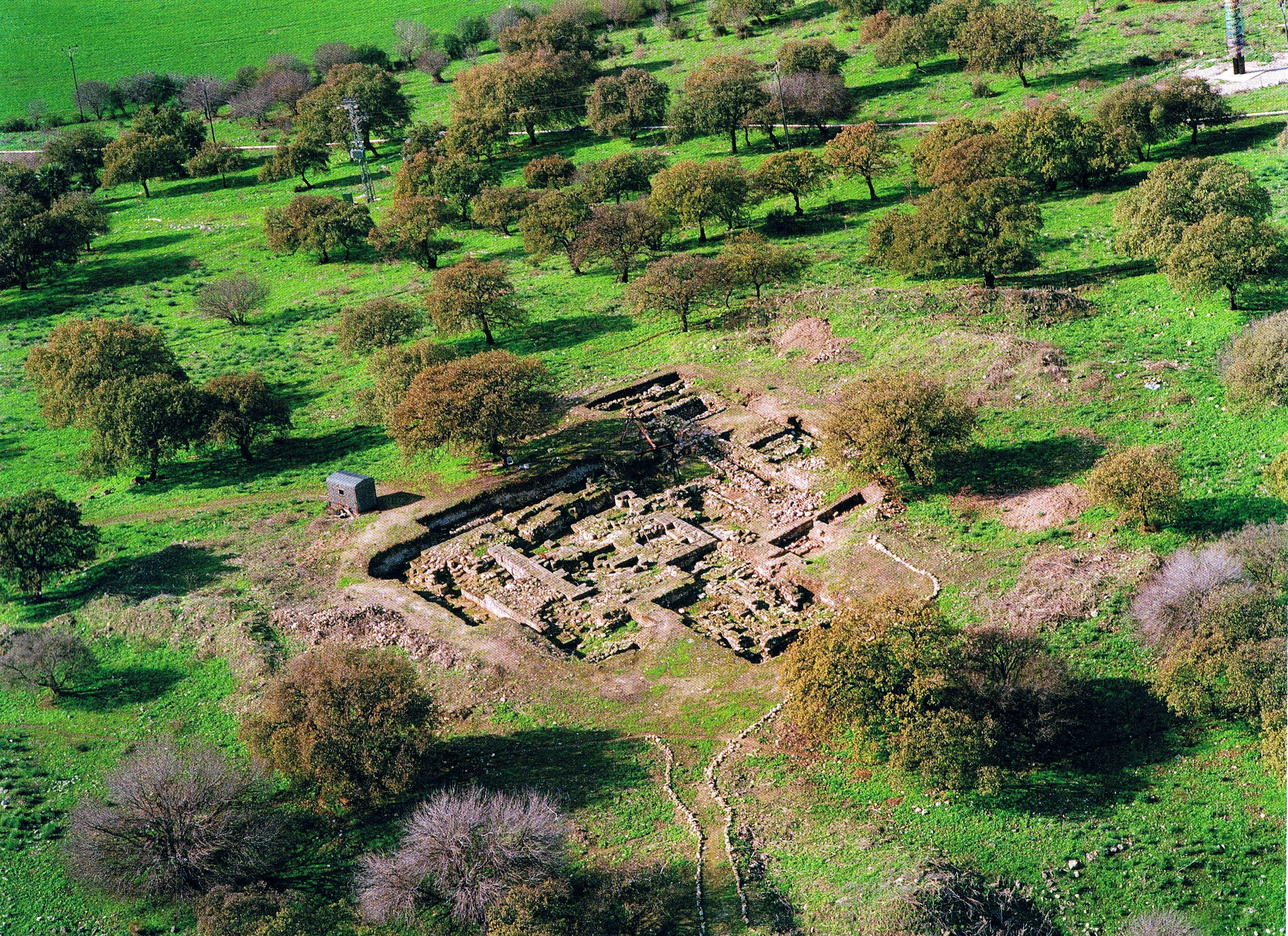 תצלום אווירי של מצד שער העמקים